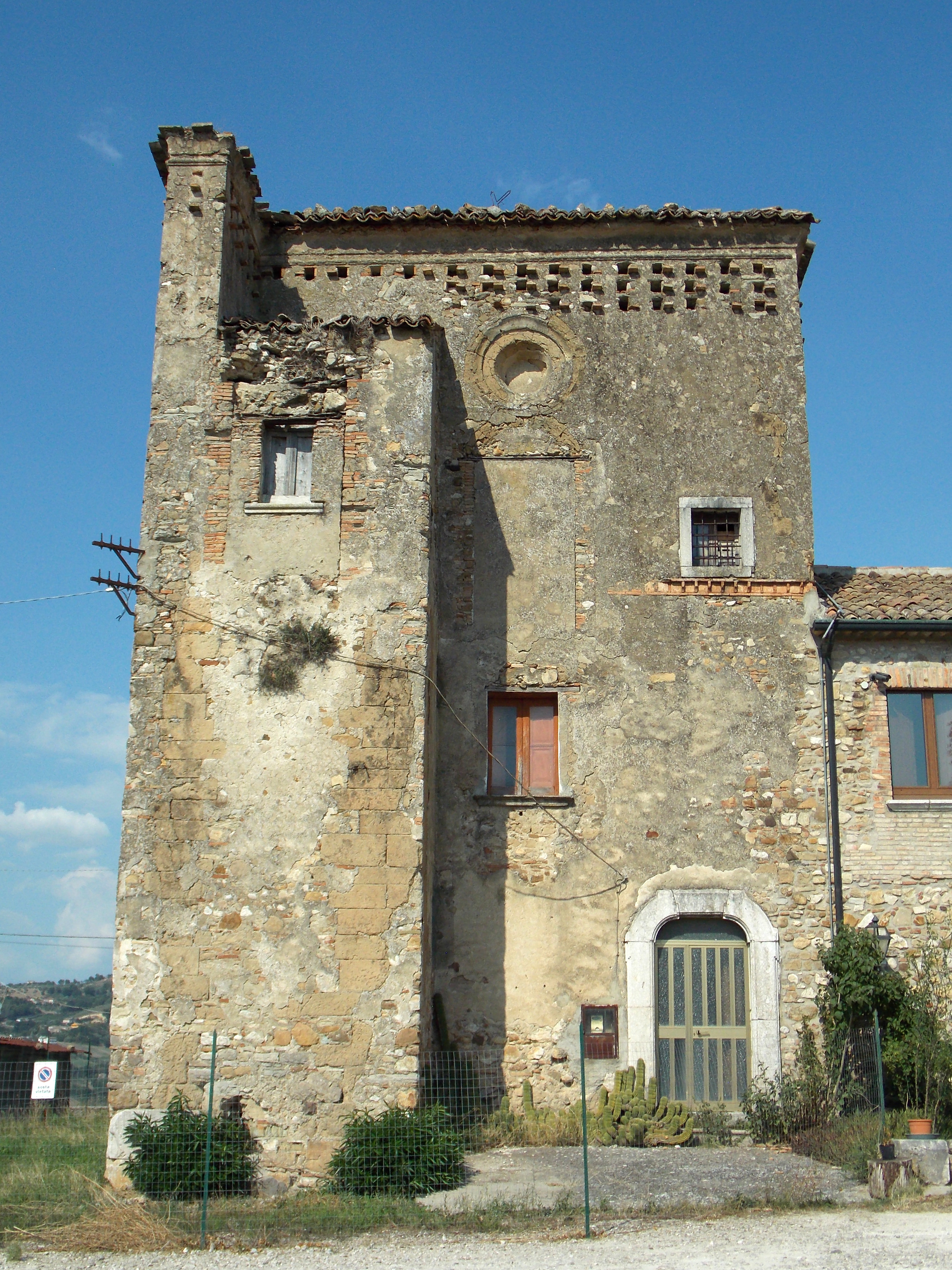 Il Casino del Principe, costruzione voluta da Federico II al Cubante di Calvi (BN)